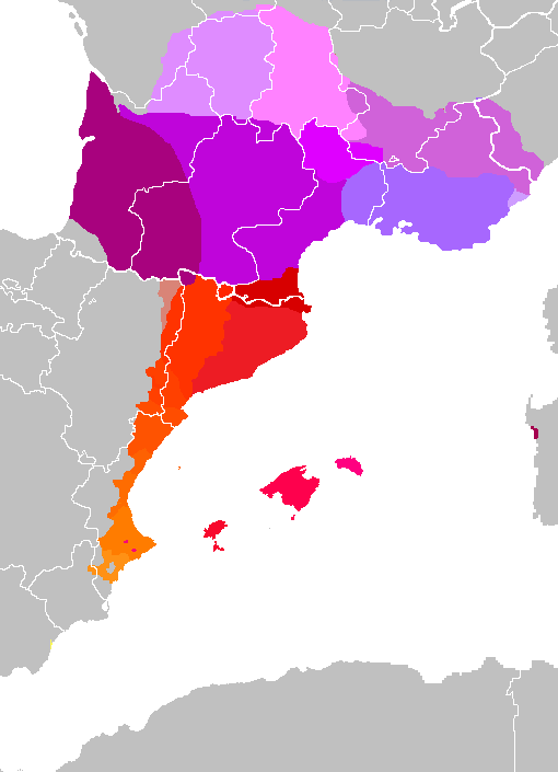 Lenguas ibero orientales Vivaroalpino Auvernense Limosín Provenzal Languedociano Gascón Balear Alguerés Rosellonés Catalán central Catalán noroccidental Valenciano